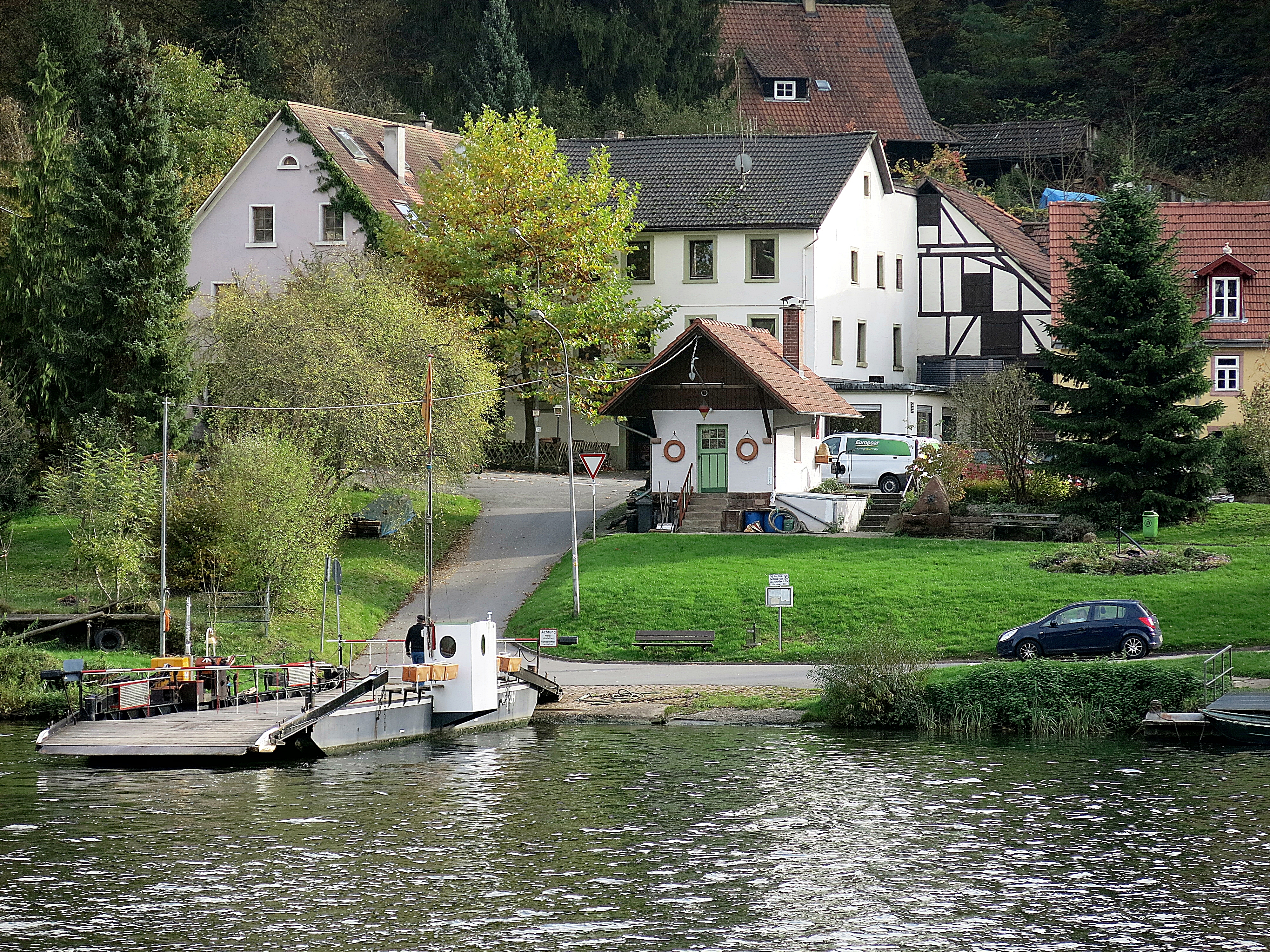 Blick vom Ufer in Neckarhausen auf die Fährstelle Neckarhäuserhof